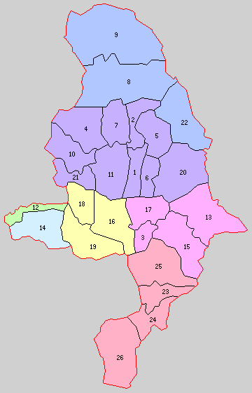 熊本県阿蘇郡の町村制時点の町村。